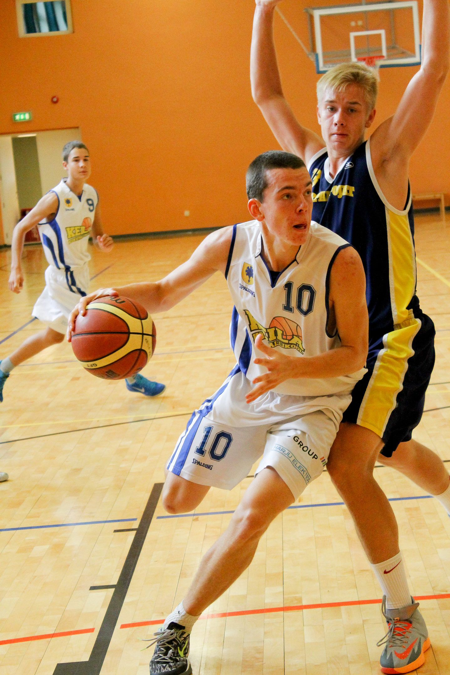 New Generation Mini Cup Kadrinas